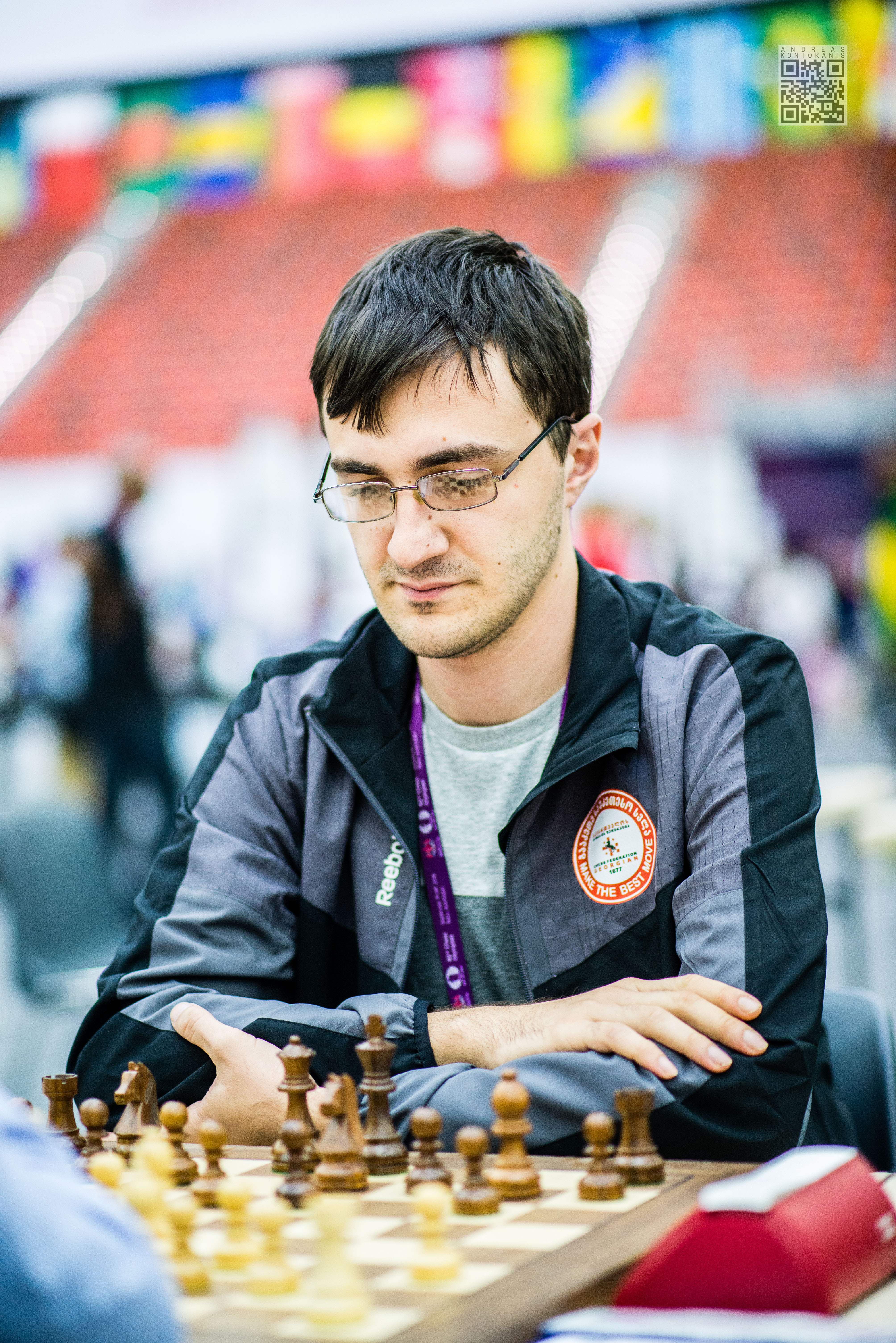 Sanikidze Tornike